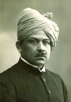 Pir-o-Murshid Ali Khan